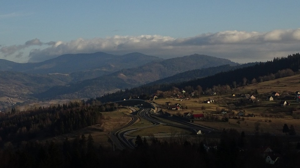 Droga S1 a obok niej Przysiółek Suche w Lalikach